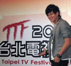 何潤東擔任2010台北電視節代言人。